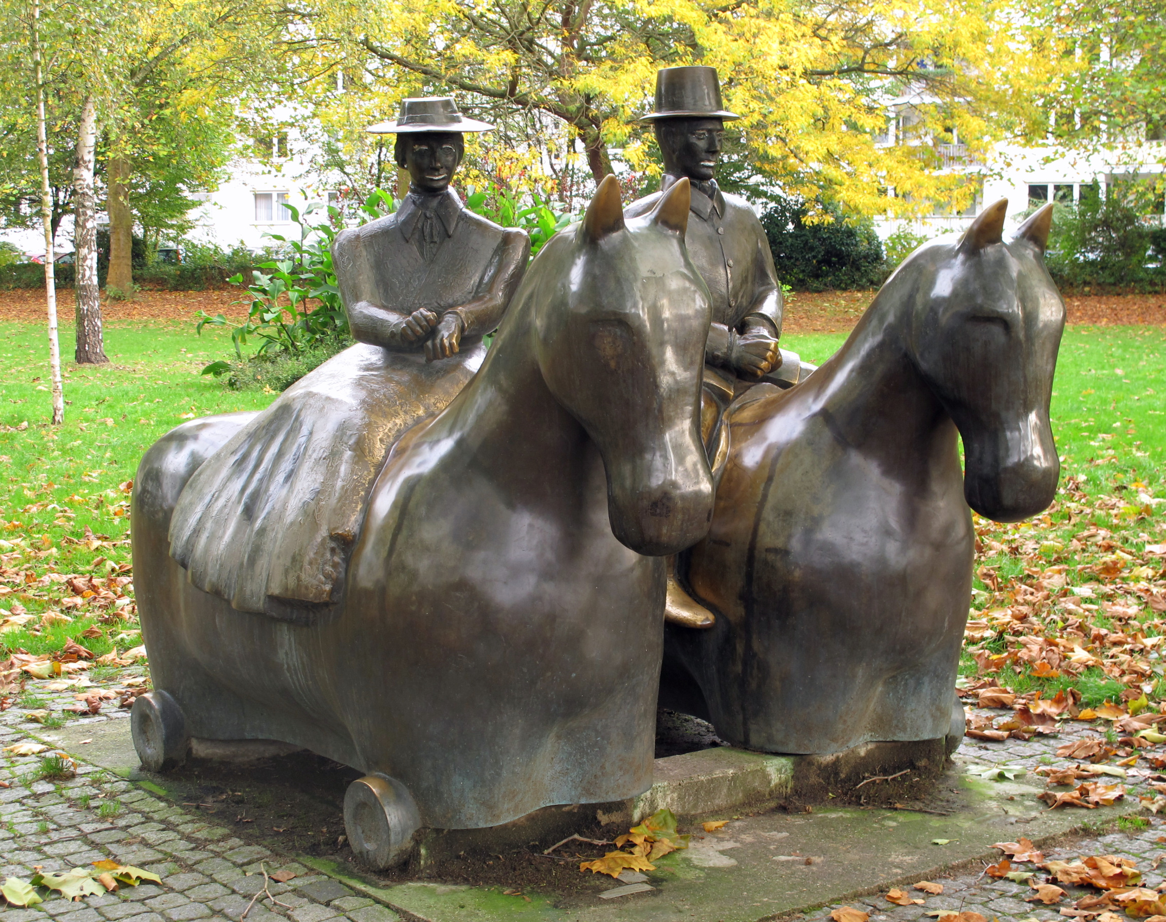 Figurengruppe: Gräfin Emma und Herzog Benno (Zweitfassung). Entwurf: Thomas Recker. Etwa lebensgroß. Aufstellungsort: Bremen-Schwachhausen, H.-H.-Meier-Allee, im Park Ecke Emmastraße. Errichtet 1988. Neuguss in Bronze nach Überarbeitung (ursprüngliche Version errichtet 1977 aus Betonwerkstein). k: kunst im öffentlichen raum bremen